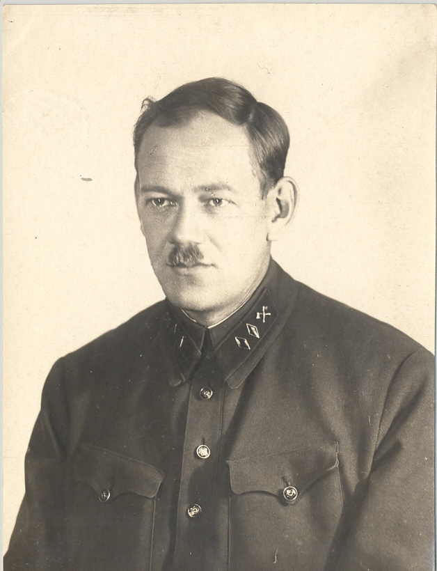 Москва